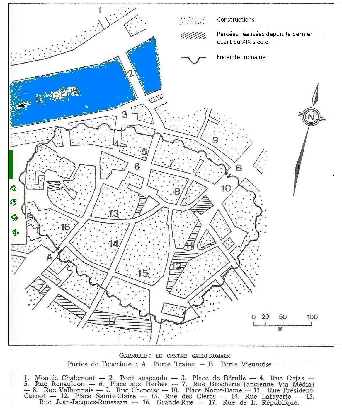 Enceinte romaine de Cularo (Grenoble)